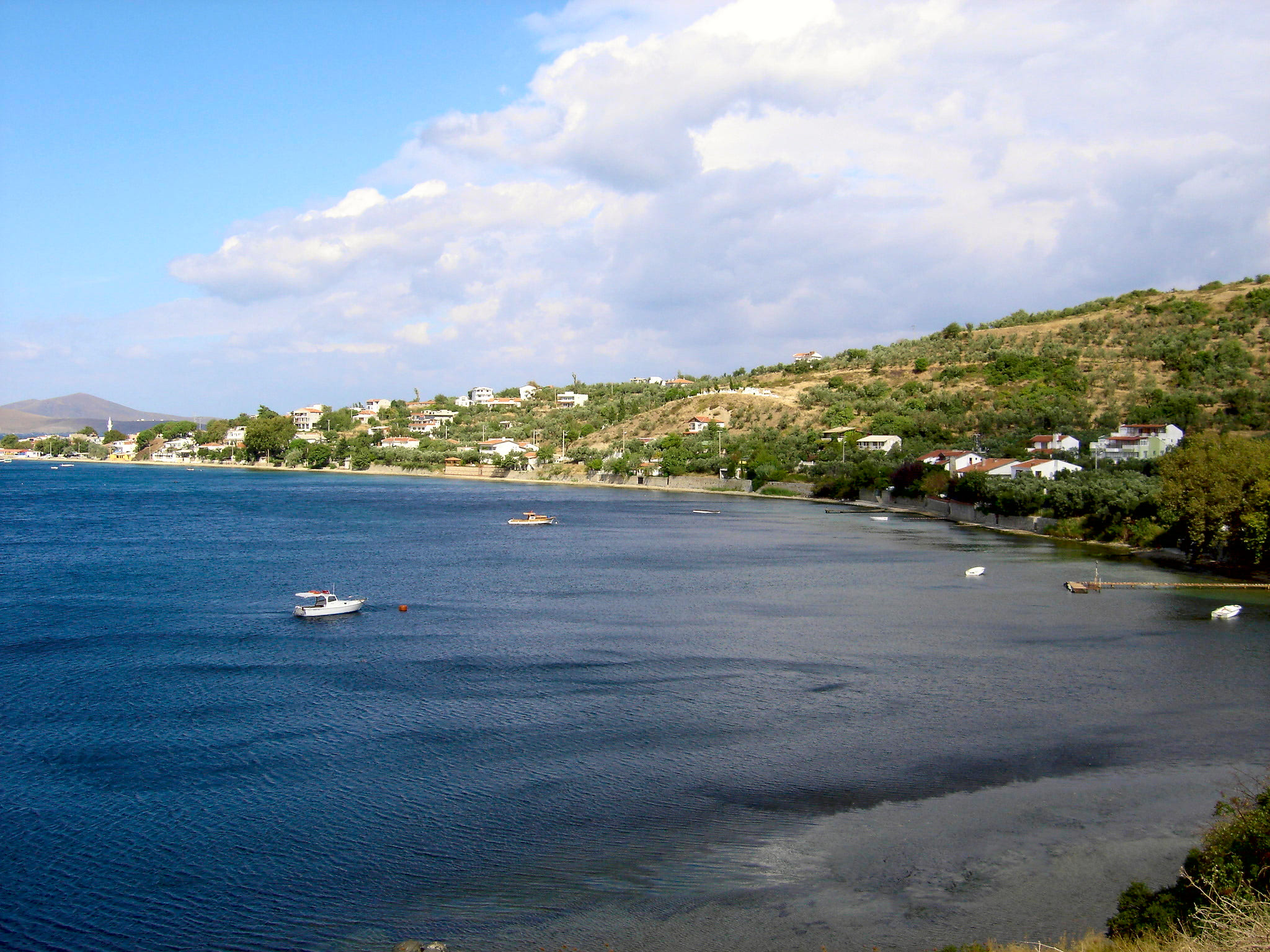 Benim cekdim resimdir